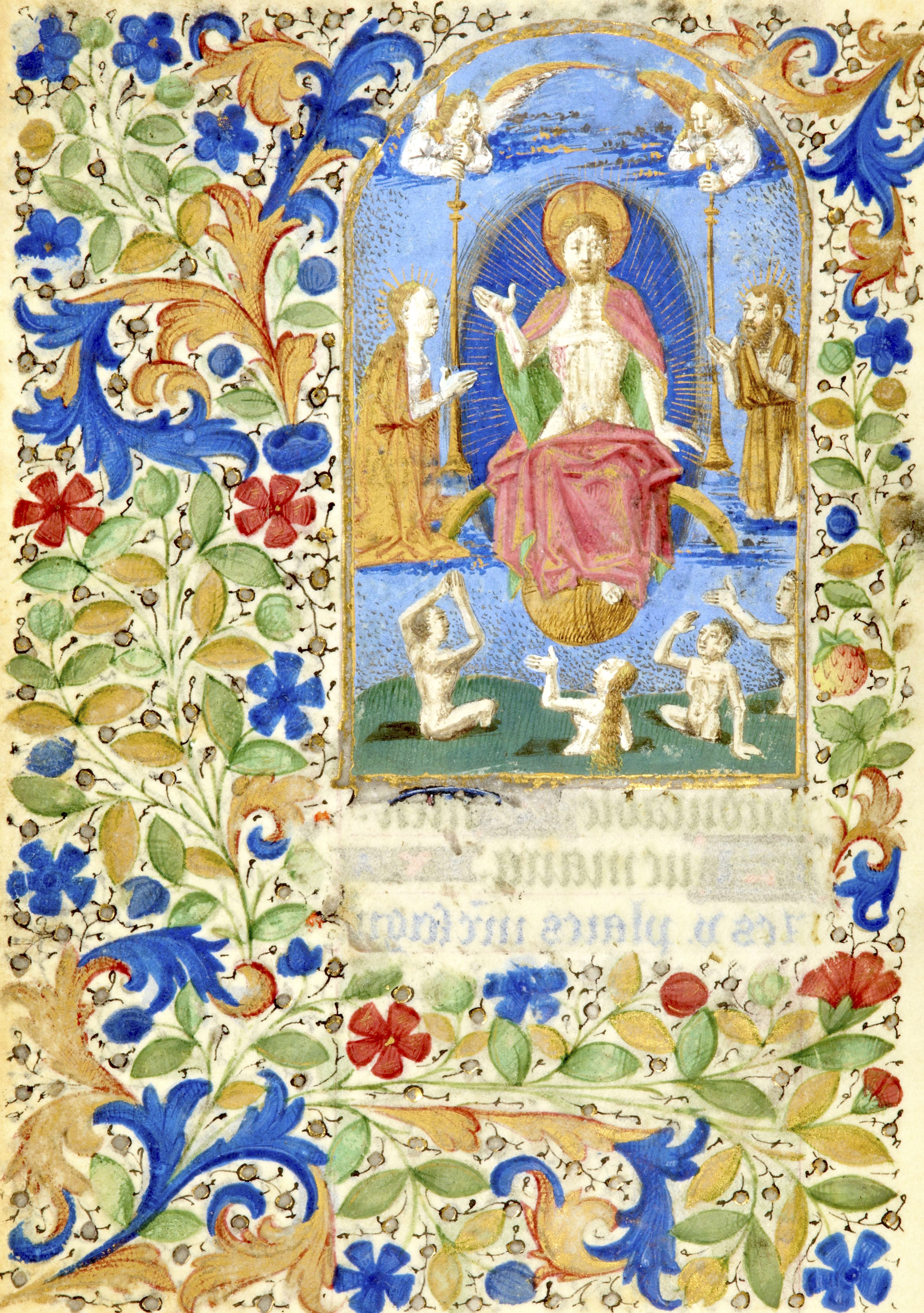 Heures de Jeanne de France BnF NAL 3244 f298v - Christ en majesté au-dessus d'une résurrection des morts